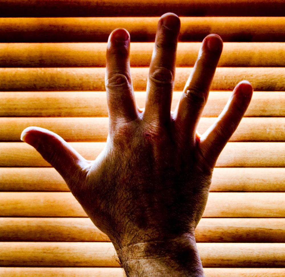 five